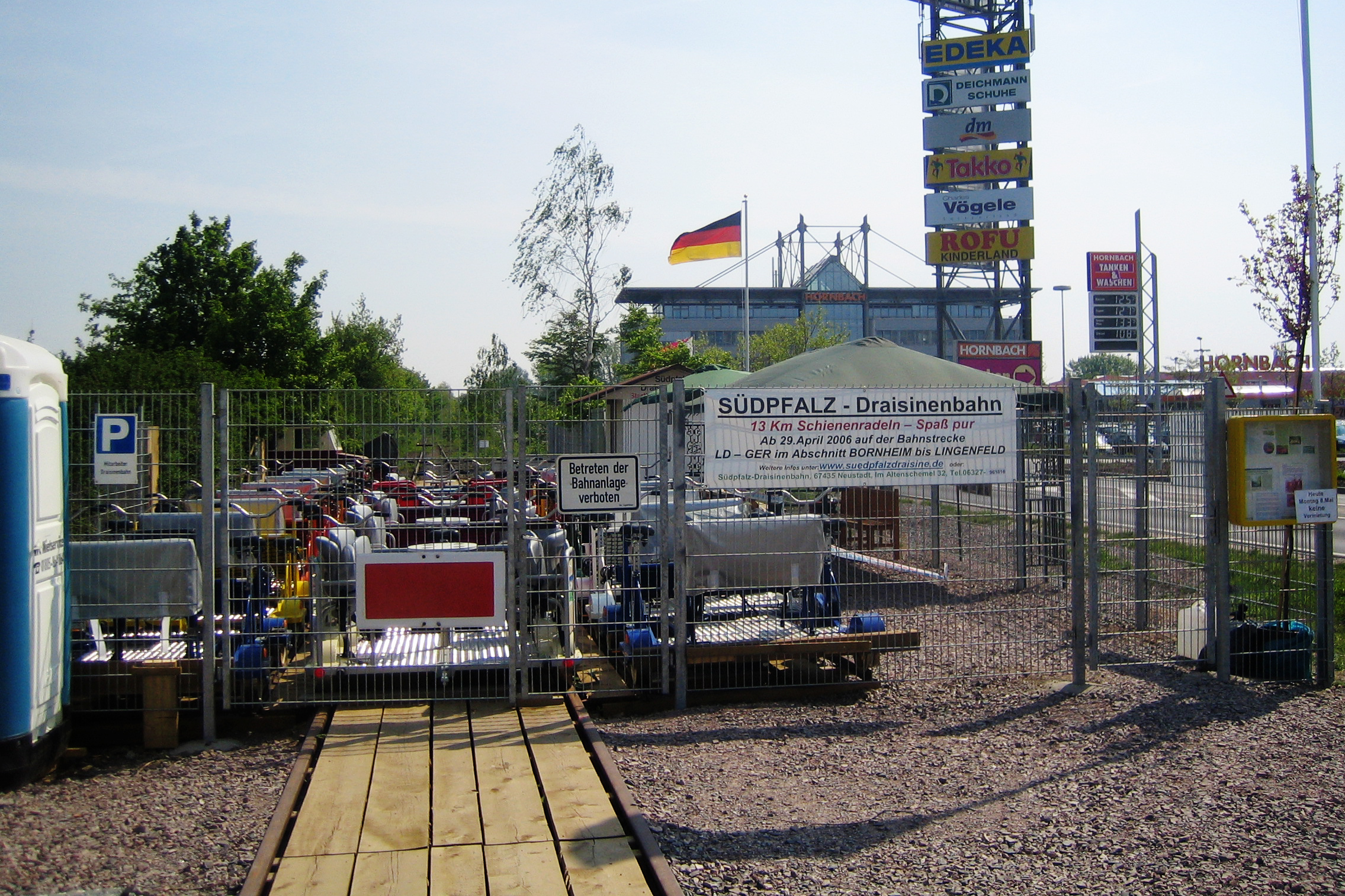 Ausgangspunkt der Südpfalz-Draisine in Bornheim